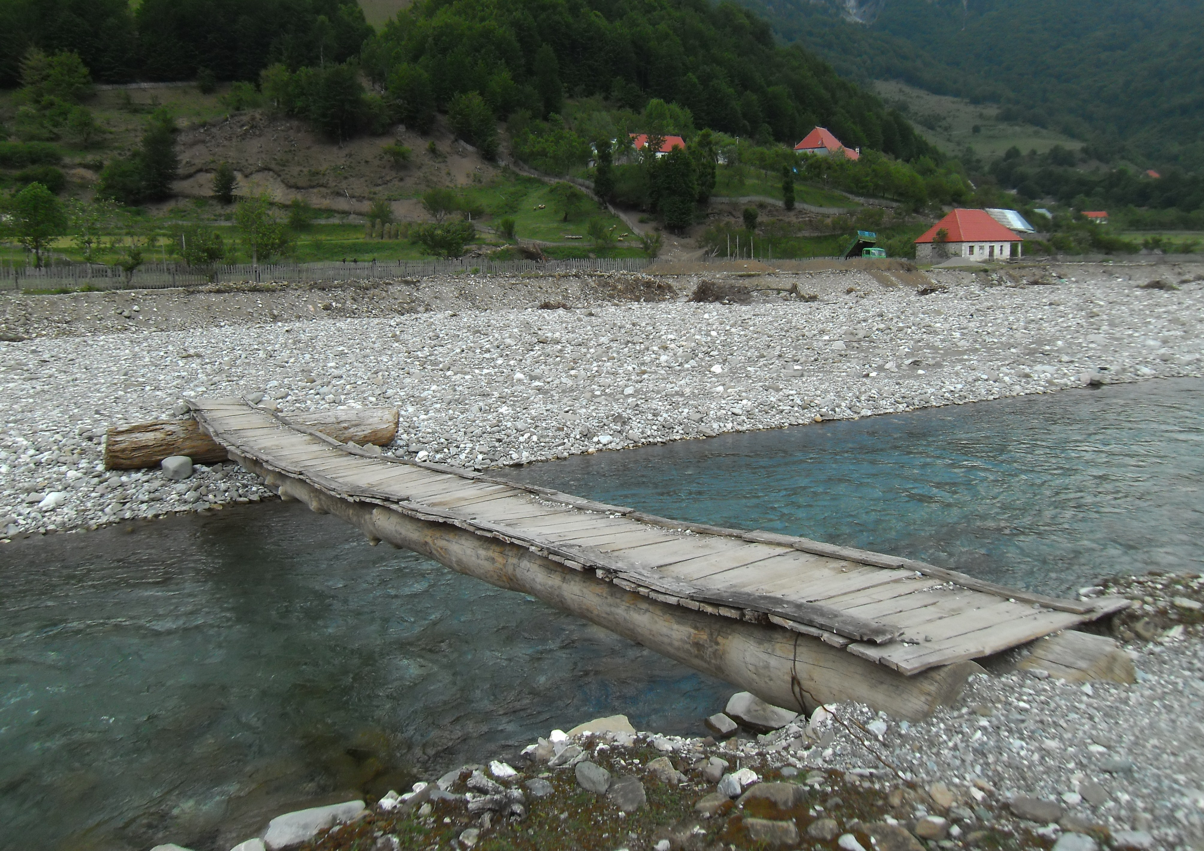 Fußgängerbrücke in Vermosh, Albanien